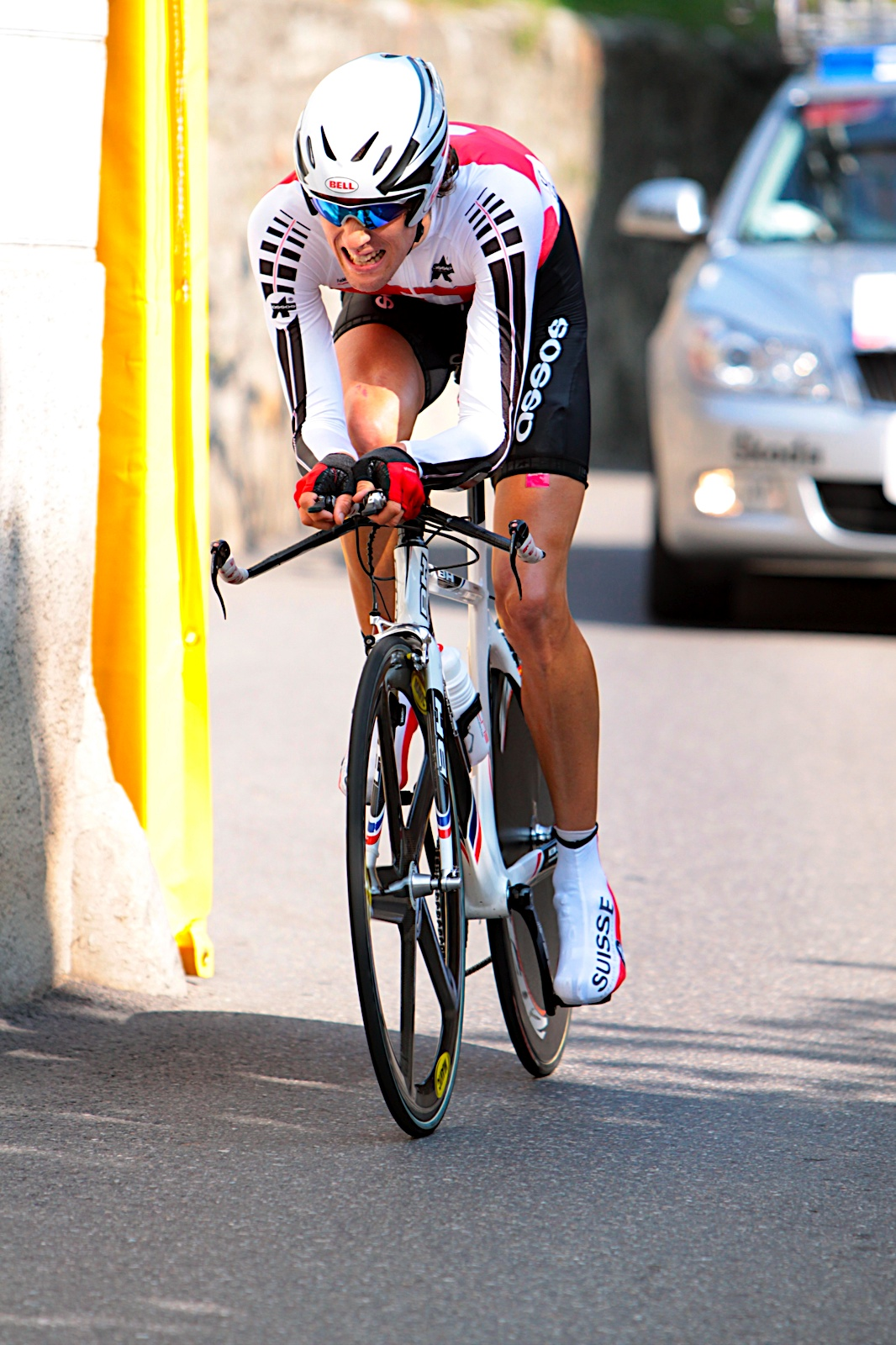 Nicolas Schnyder en 2009 au championnat du monde de contre-la-montre de Mendrisio catégorie U23